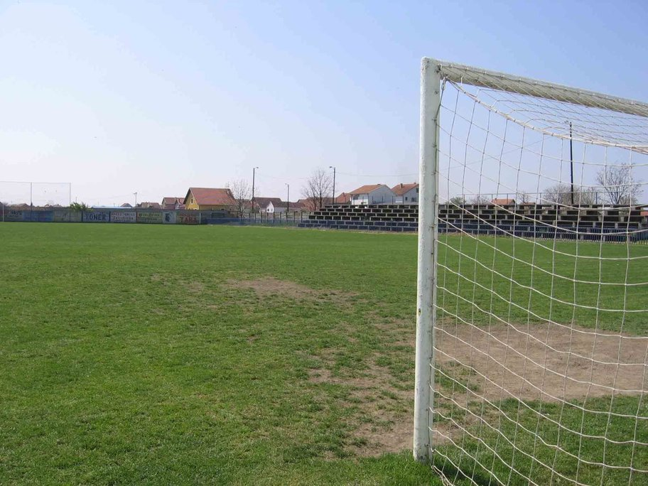 Стадион Батајница